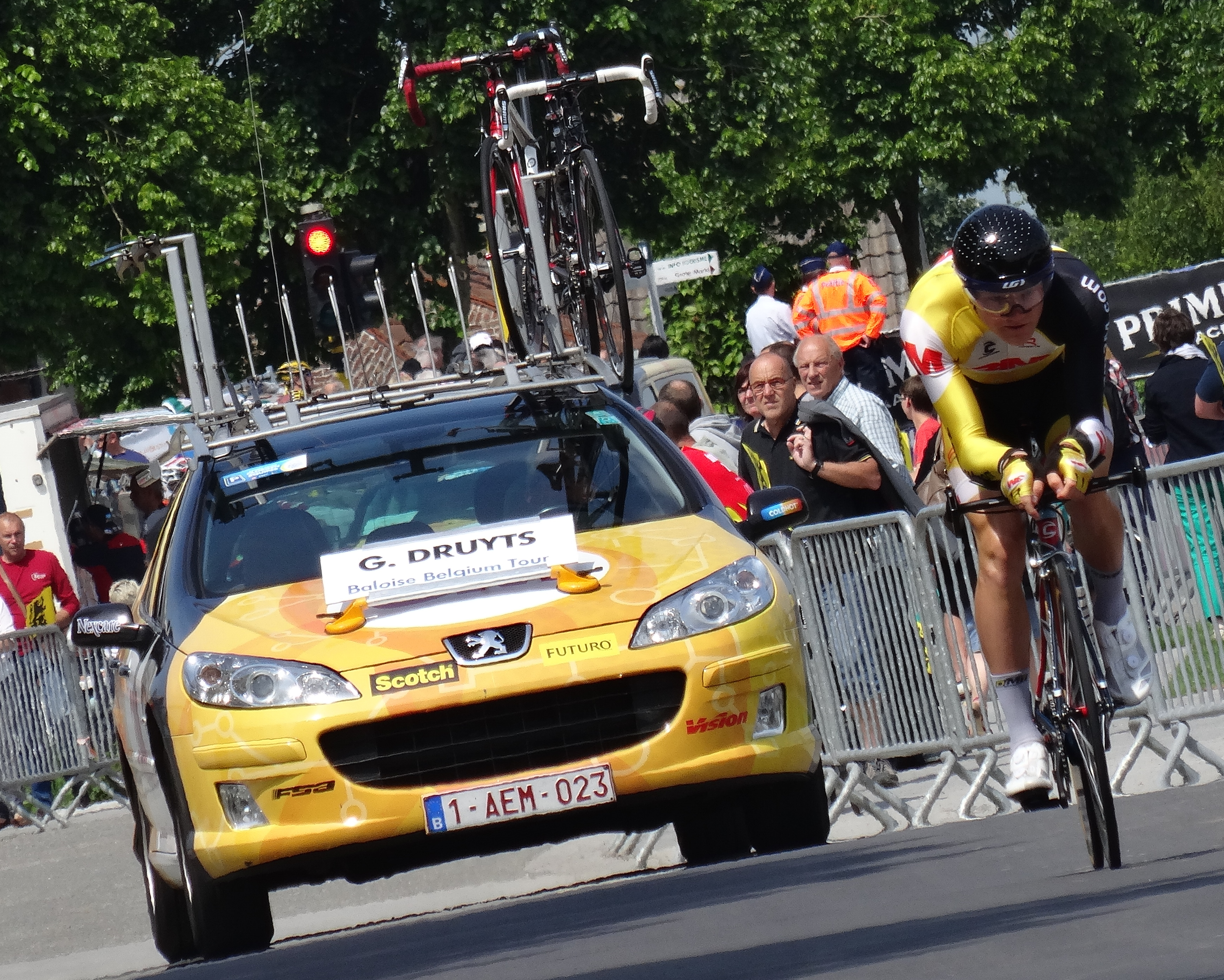 Reportage photographique réalisé le vendredi 30 mai à l'occasion du contre-la-montre individuel de la troisième étape du Tour de Belgique 2014 à Dixmude, Belgique.